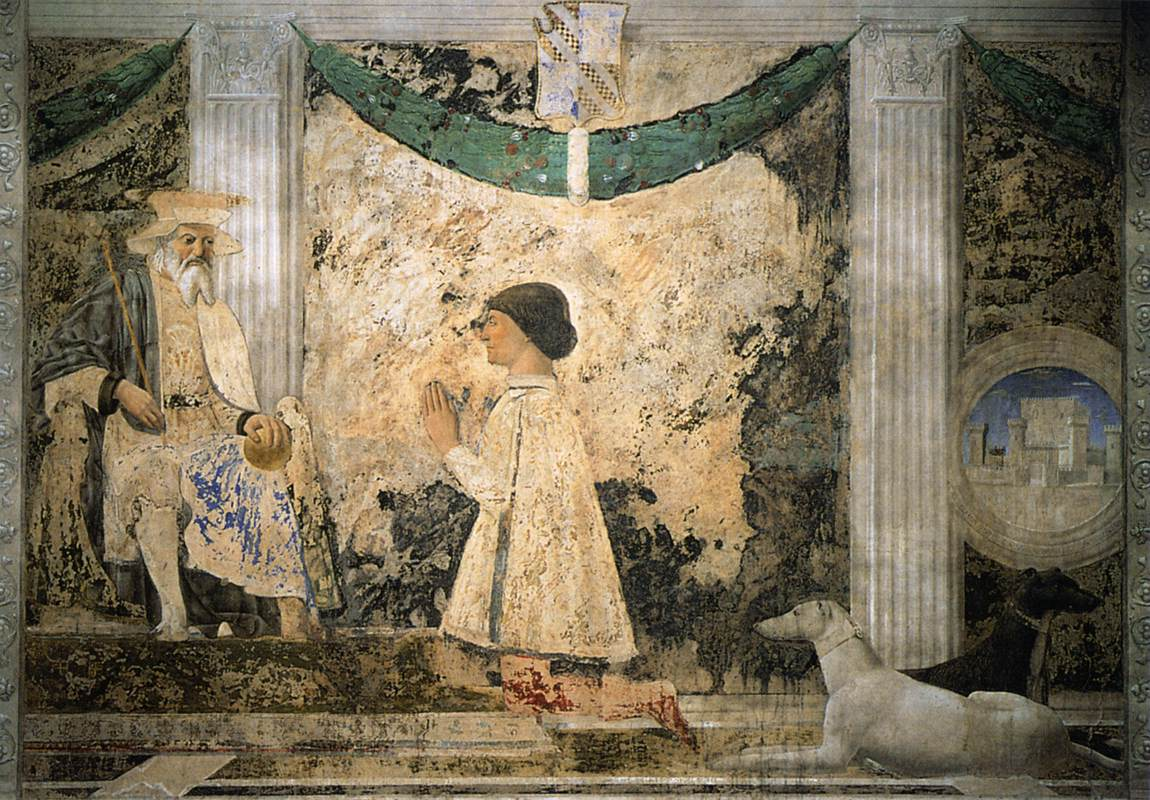 PIERO della FRANCESCA St Sigismund and Sigismondo Pandolfo Malatesta Fresco, 257 x 345 cm Tempio Malatestiano, Rimini